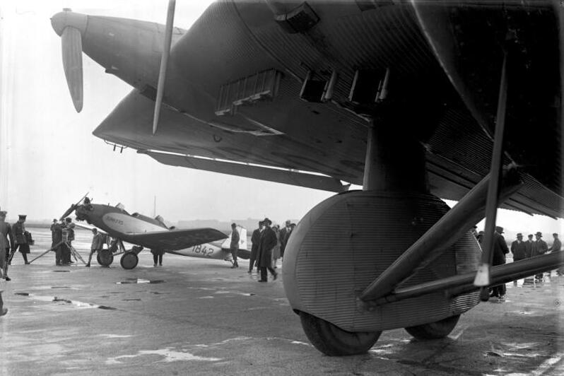 Das größte deutsche Landflugzeug der Welt Junkers "G 38" landete auf dem Centralflughafen in Berlin-Tempfelhof! Blick auf die riesigen Ausmasse der Junkers "G 38" auf dem Centralflughafen in Berlin-Tempelhof.